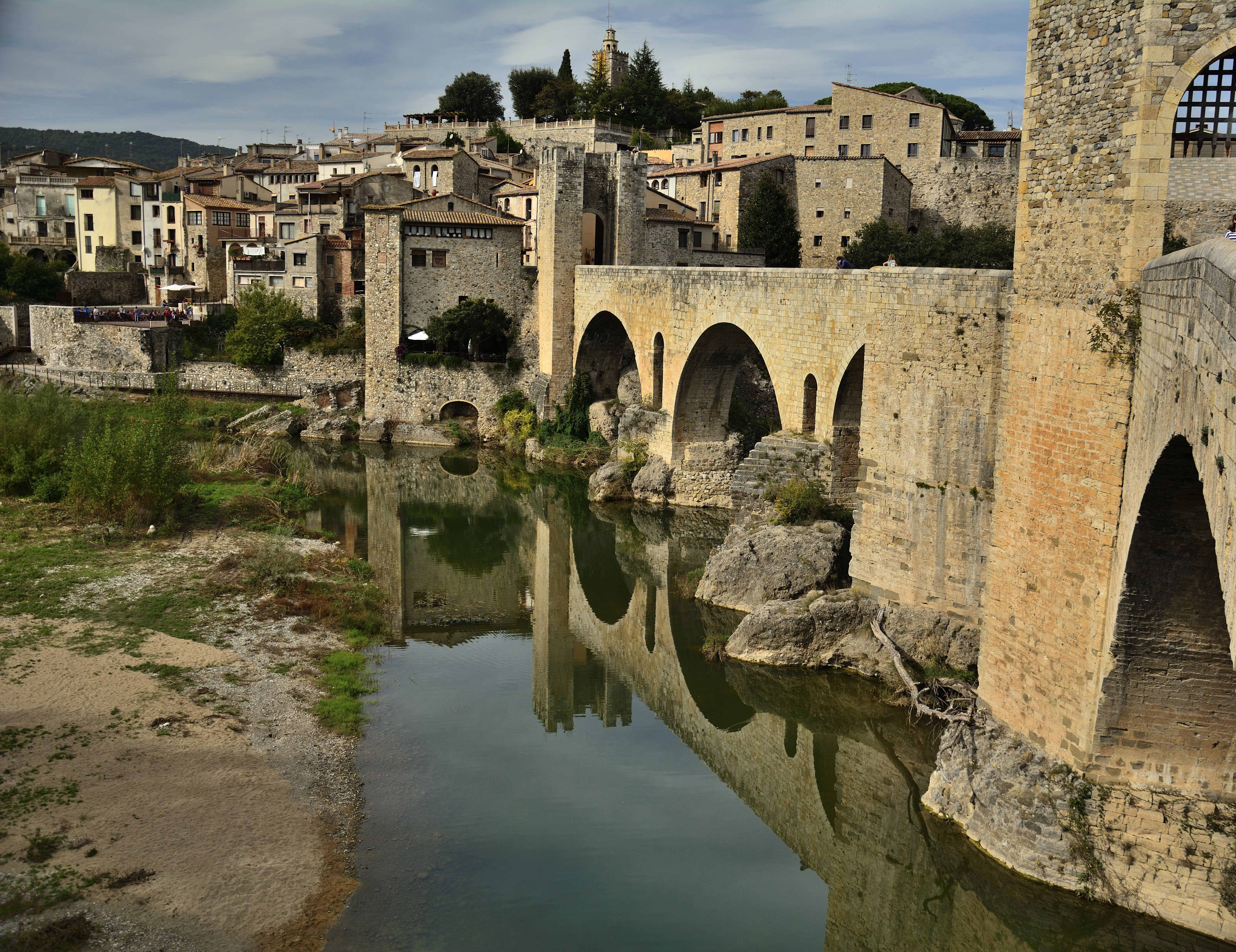 Rio Fluvia-Besalu This is a photography of a Site of Community Importance in Spain with the ID: ES5120021. Natura2000 entry, EEA entry